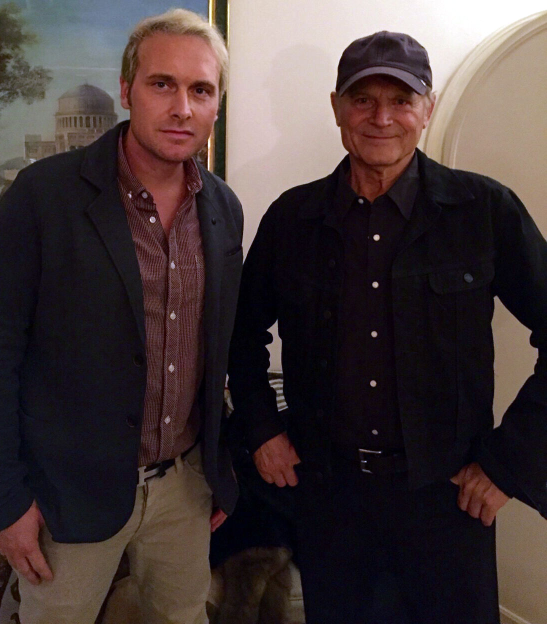 Marcus Zölch und Terence Hill